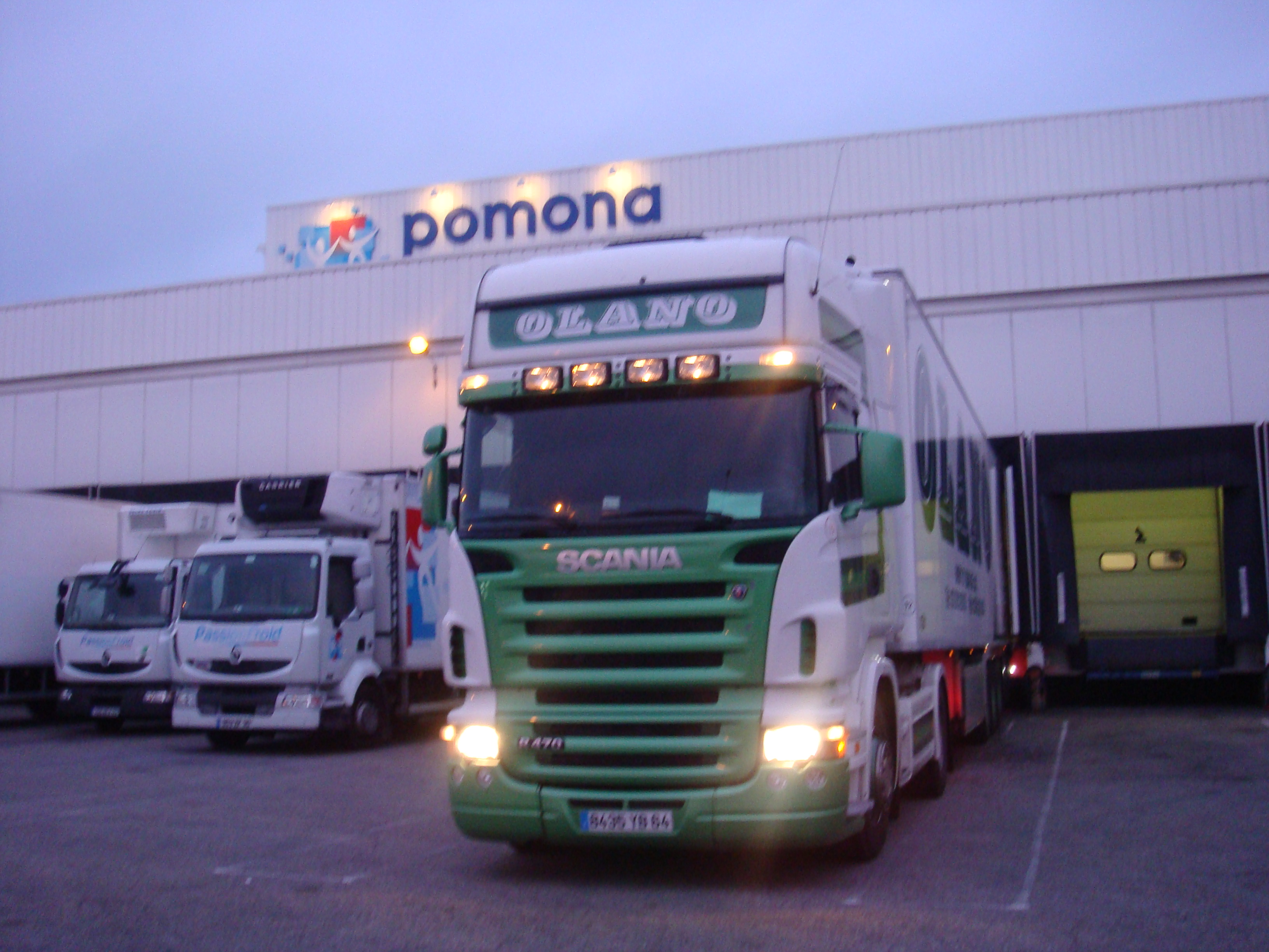 Un camion de St Jean de Luz à Pomona Nimes.